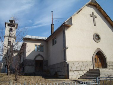 Esztelnek (Estelnic) Catholic Church